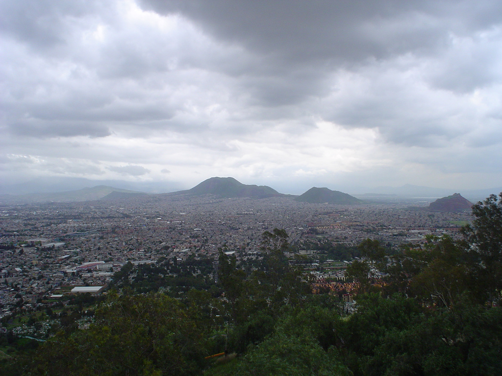 Vista desde la cumbre del cerro de la Estrella (Iztapalapa, México) hacia el sureste. Se observa la sierra de Santa Catarina. De derecha a izquierda se encuentran los volcanes Yuhualixqui (de color rojo), Xaltepec, Tetecón, Tecuauhtzin, Guadalupe y La Caldera.